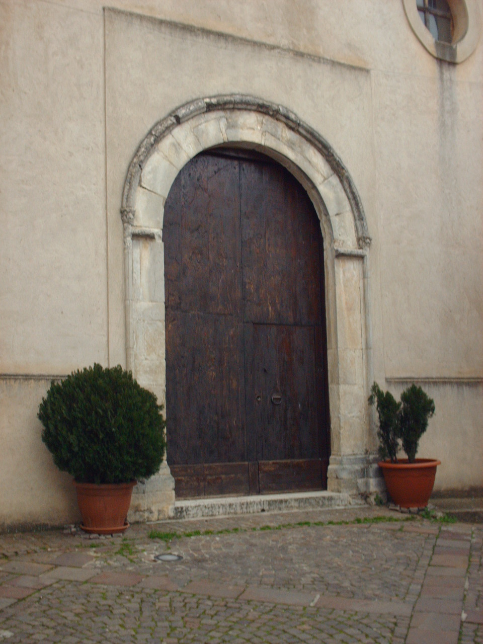 Chiesa Immacolata 2